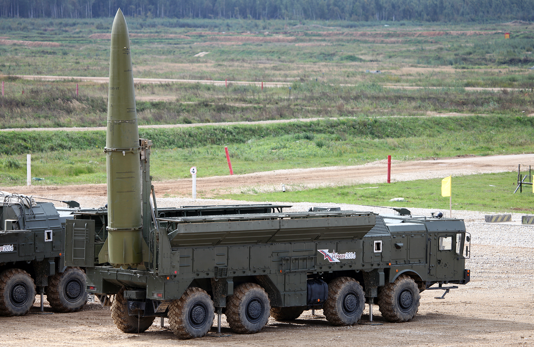 Самоходная пусковая установка 9П78-1 ОТРК 9К720 Искандер-М с ракетами 9М723К5 (9P78-1 TEL of 9K720 Iskander-M SRBM system with 9M723K5 missiles)